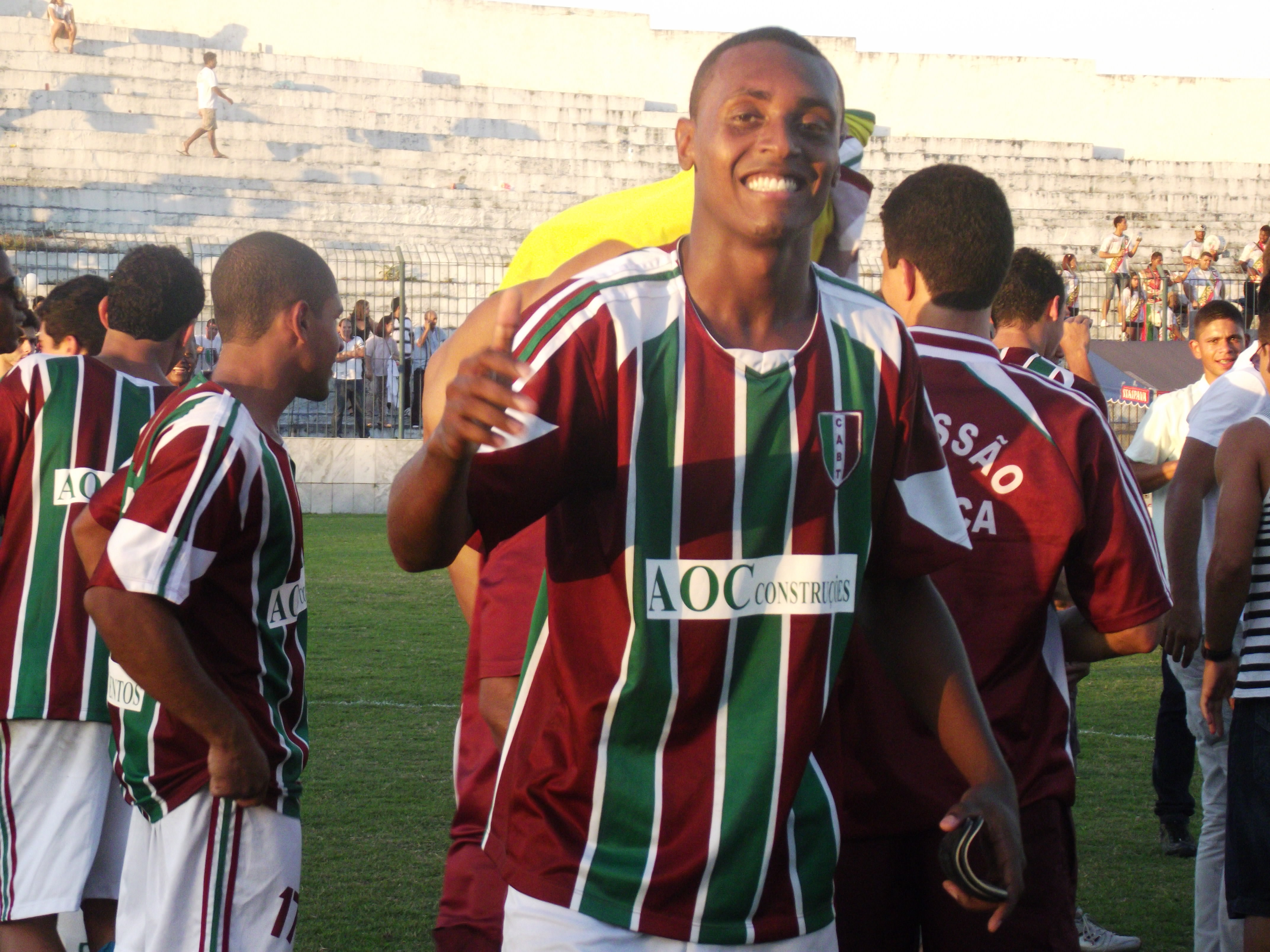 Festa da equipe do Barra da Tijuca pelo acesso conquistado à Série B.